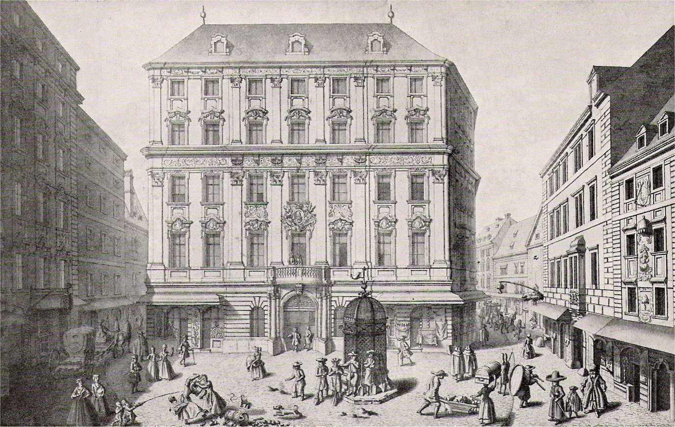 Ansicht des Schönbrunnerhauses mit seiner nächsten Umgebung. Nach Salomon Kleiner's Originale vom Jahre 1725-1733.